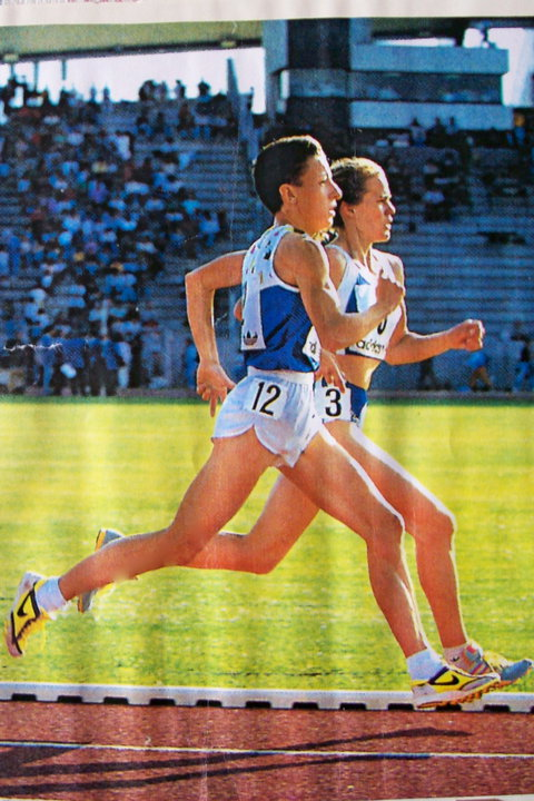 Marzia Gazzetta in a race in Italy in 1980s